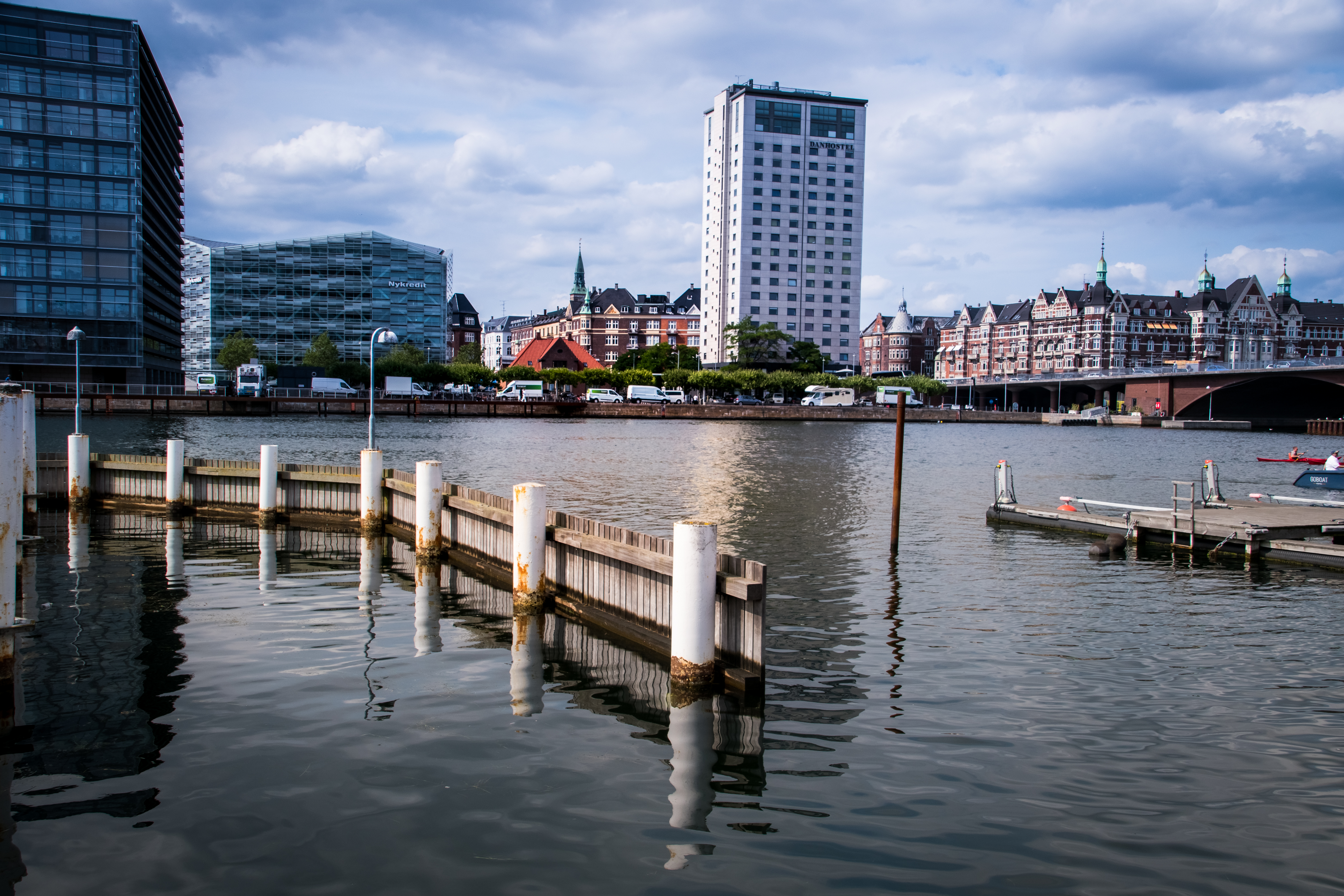 Danhostel Copenhagen City in Copenhagen, Denmark